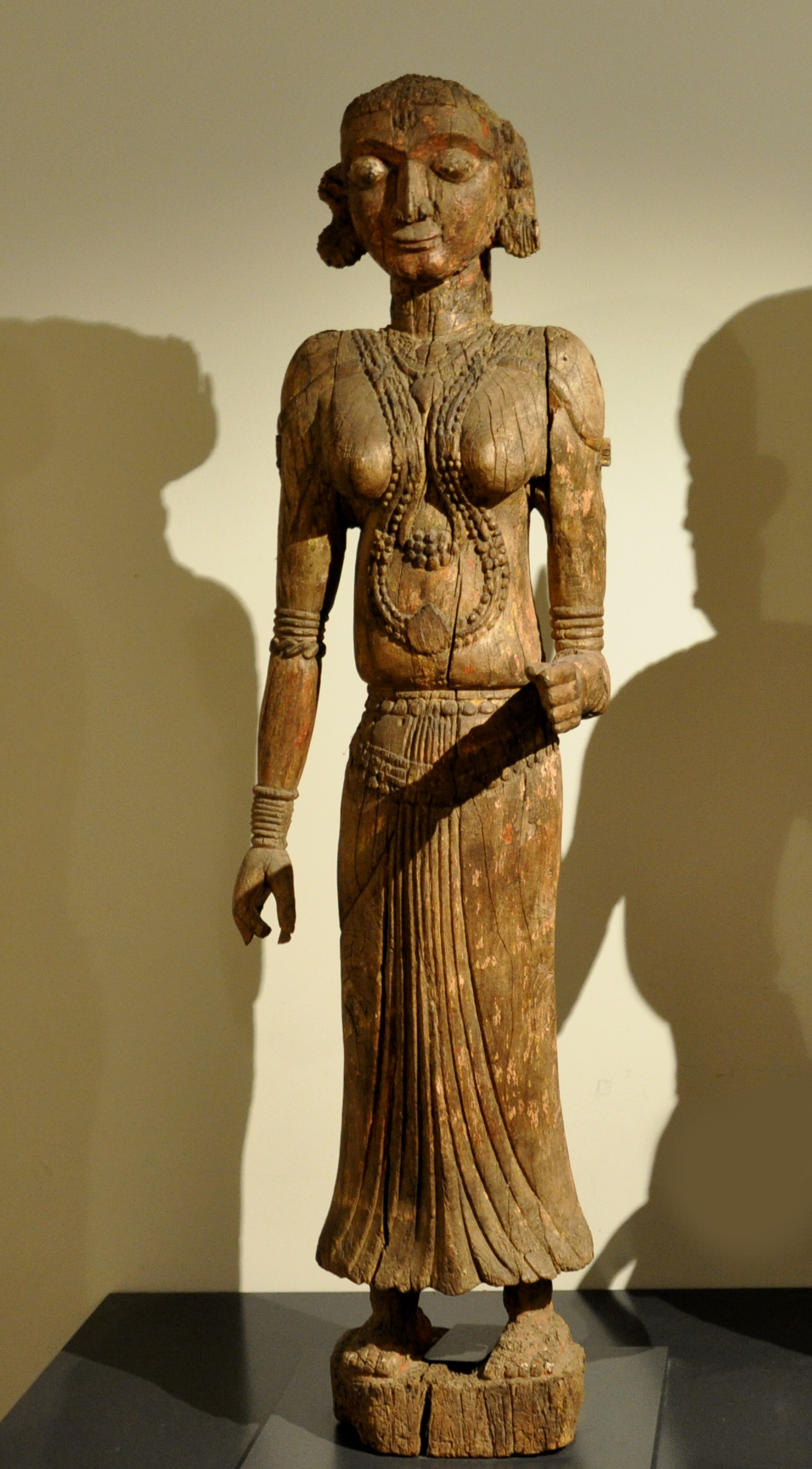 Abbaga Daraka (links) und Koti oder Chennaya (rechts), Indien, Karnataka, Tulunadu, 20. Jahrhundert; Holz Museum Rietberg, Zürich; Schenkung Heidi und Hans Kaufmann, Inv. Nr. 2008.51 und 2008.51 (am Eingang zum Schaudepot)